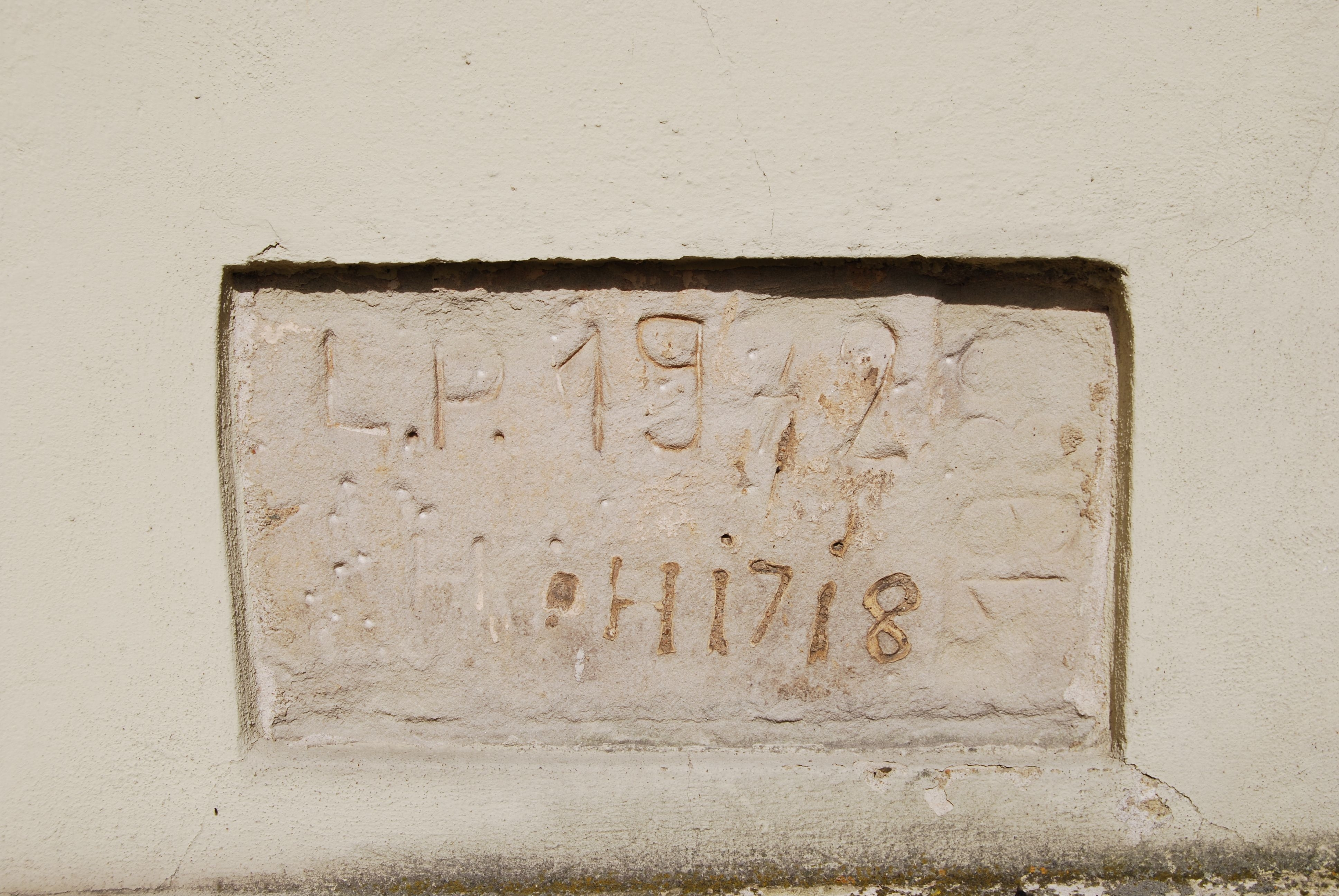 Údaj na kostel sv. Václava, Brozánky (Řehlovice)